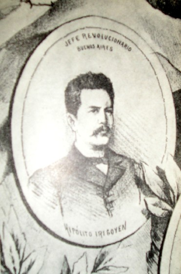 Hipólito Yrigoyen en la Revolución de 1893. Dibujo de "Demócrito" (Eduardo Sojo, 1849-1908) publicado en la revista Don Quijote, 13 de agosto de 1893. Buenos Aires.